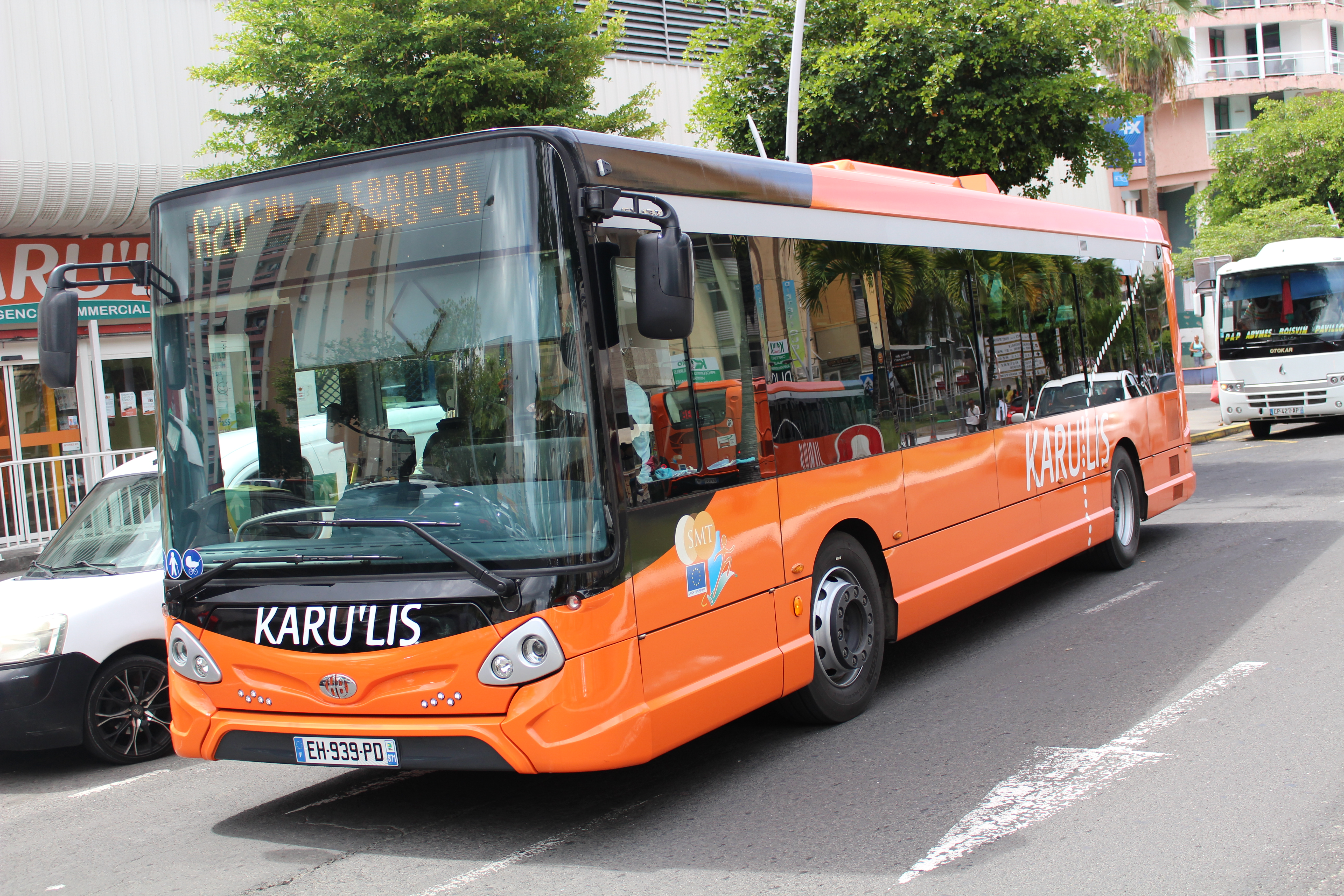 Bus KARU'LIS passant devant l'agence commerciale du centre-ville de Pointe-à-Pitre